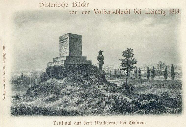 Postkarte: Denkmal auf dem Wach(t)berge bei Göhren in Erinnerung an die Völkerschlacht bei Leipzig, jetziger Standort an der Kirchenruine Wachau